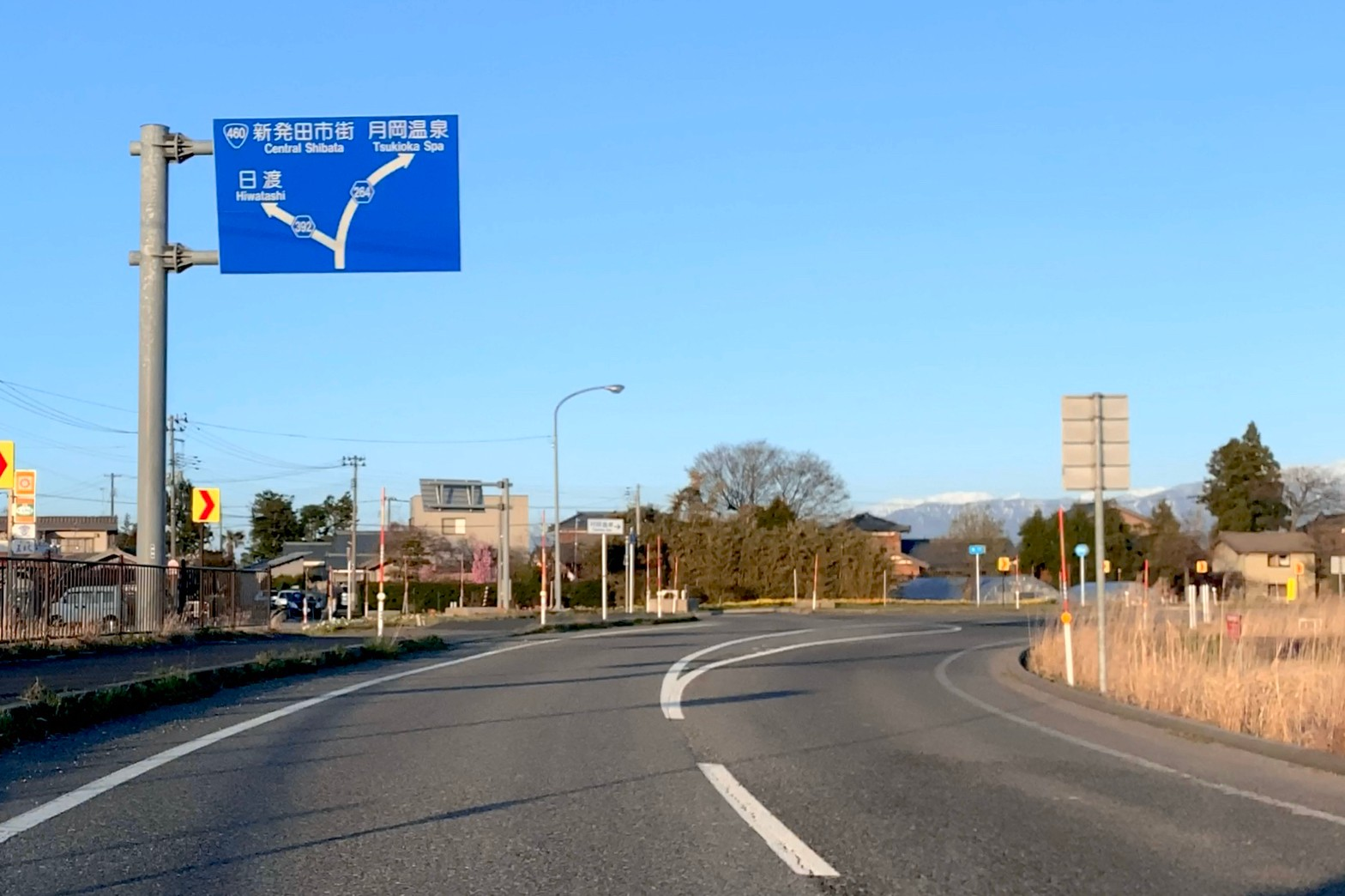 新潟県道264号豊栄天王線 新発田市鳥穴付近（2020年4月）